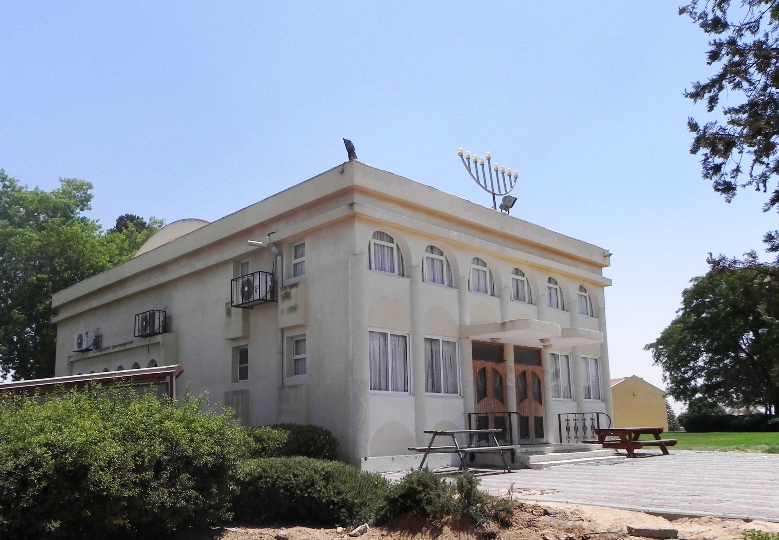 אשבול בית הכנסת